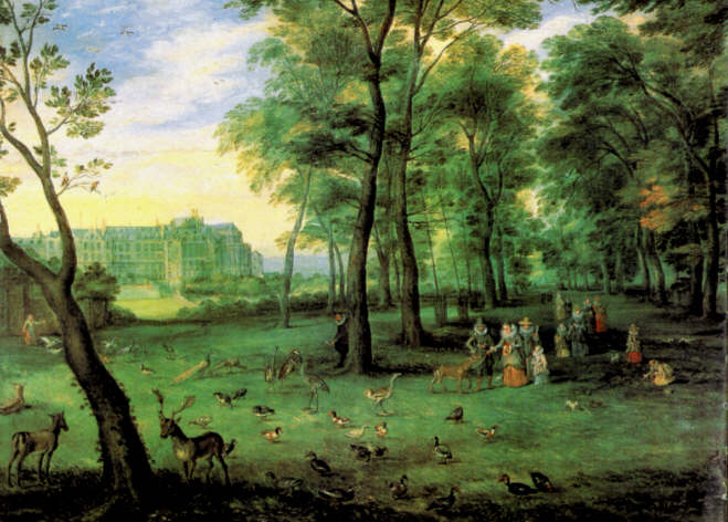 De Aartshertogen Albrecht en Isabella op wandel in het park van het paleis (De Warande). De rechter beeldhelft ontbreekt. Links op de achtergrond is het Paleis op de Koudenberg te zien. Jan Brueghel de Oude (1568-1625). Geschilderd tussen 1609 en 1621. Olie op paneel. 45,5x27,5cm. Antwerpen, Rubenshuis. Inv nr S 130.